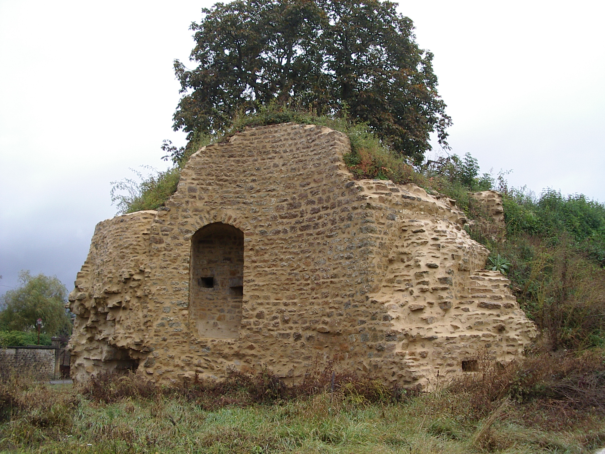 Vestiges du Château : Le château de Lumes est un château situé à Lumes, en France